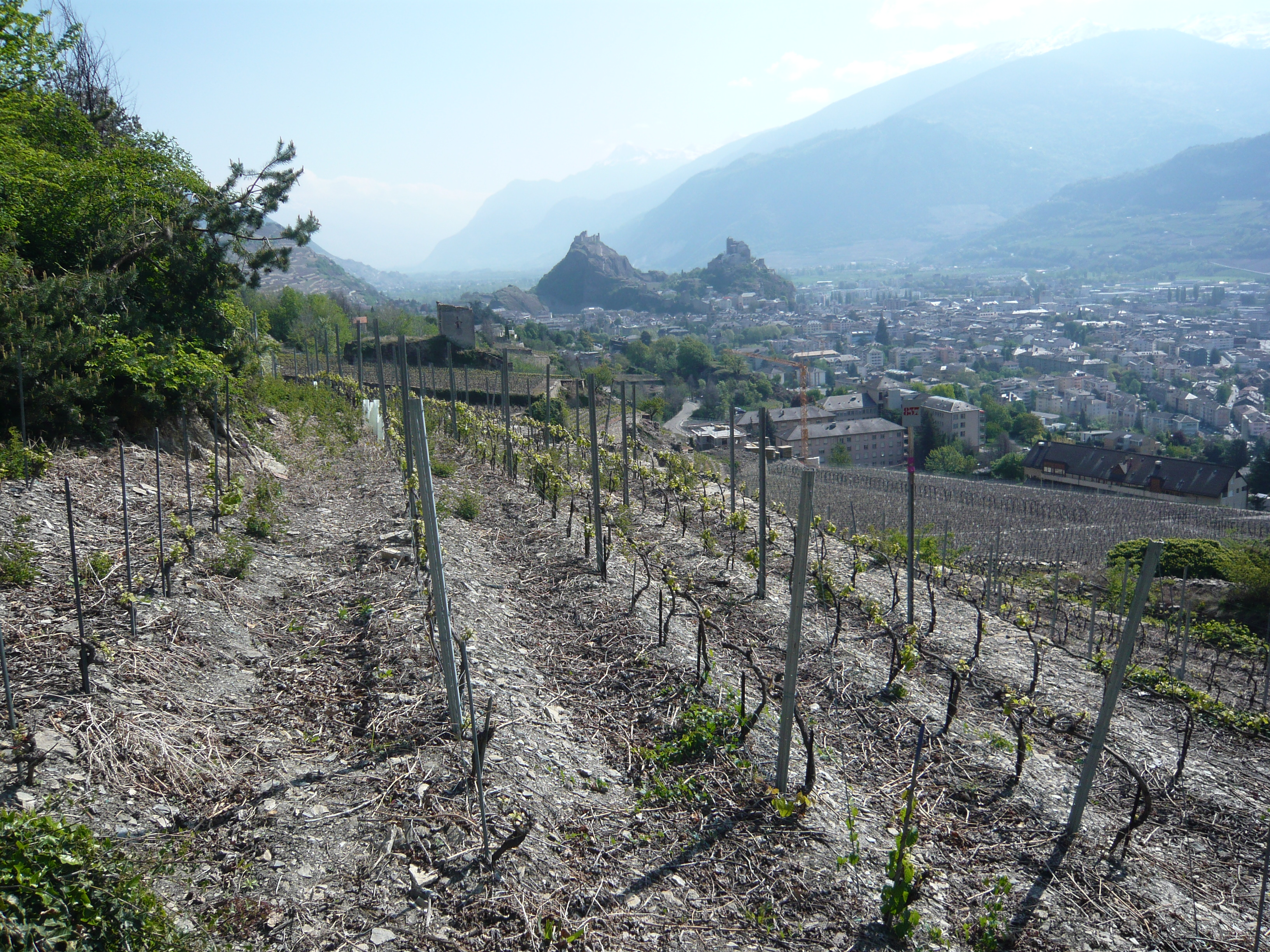 Vignes au nord de la Ville de Sion avec vue en direction de l'est. Valère et Tourbillon à l'arrière plan.